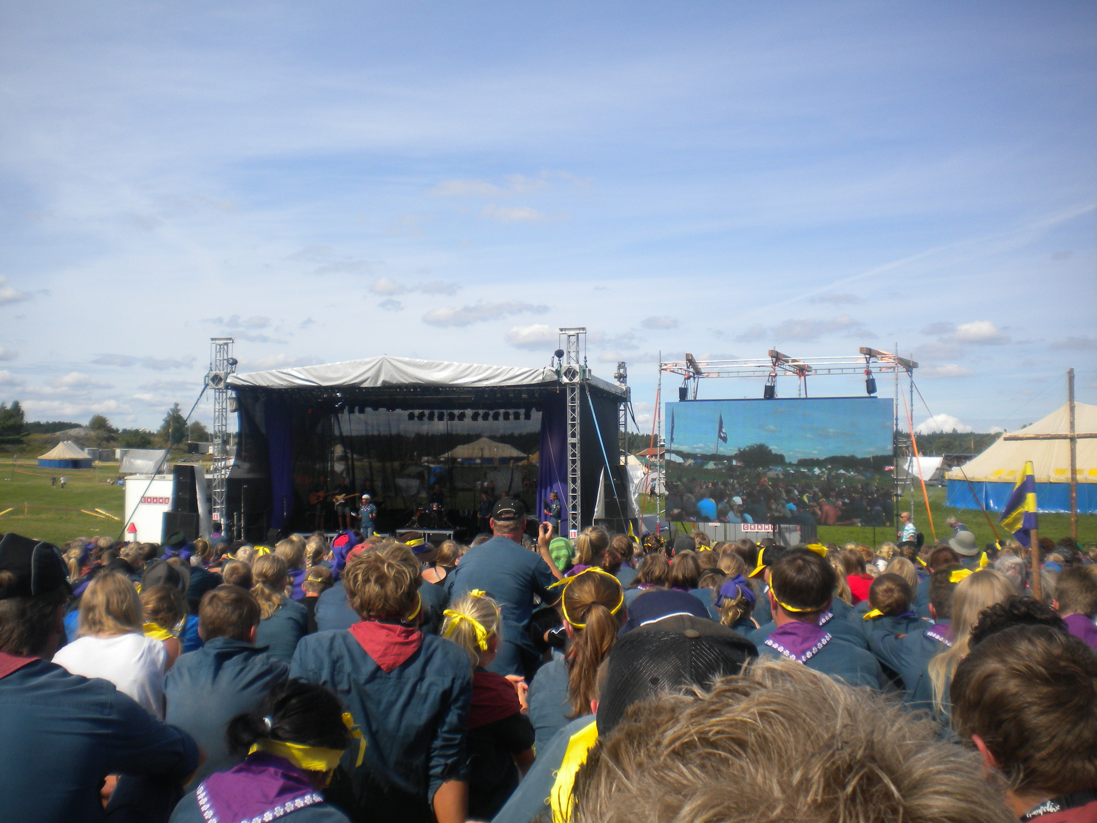 Bild från invigningsceremonin för equmeniascout under riksscoutlägret Trampolin den 5 augusti 2013.